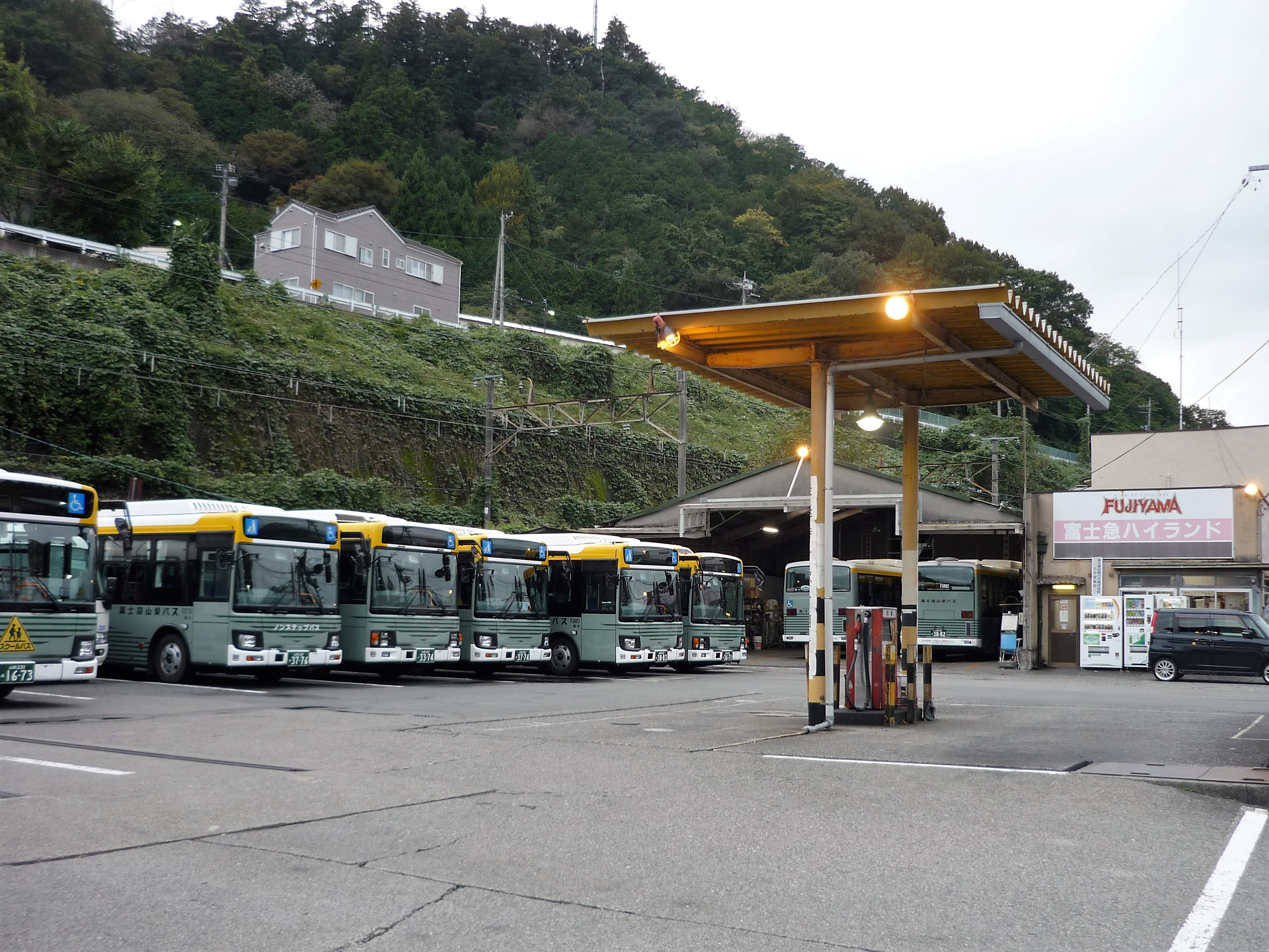 富士急山梨バス大月営業所（大月市猿橋町猿橋）